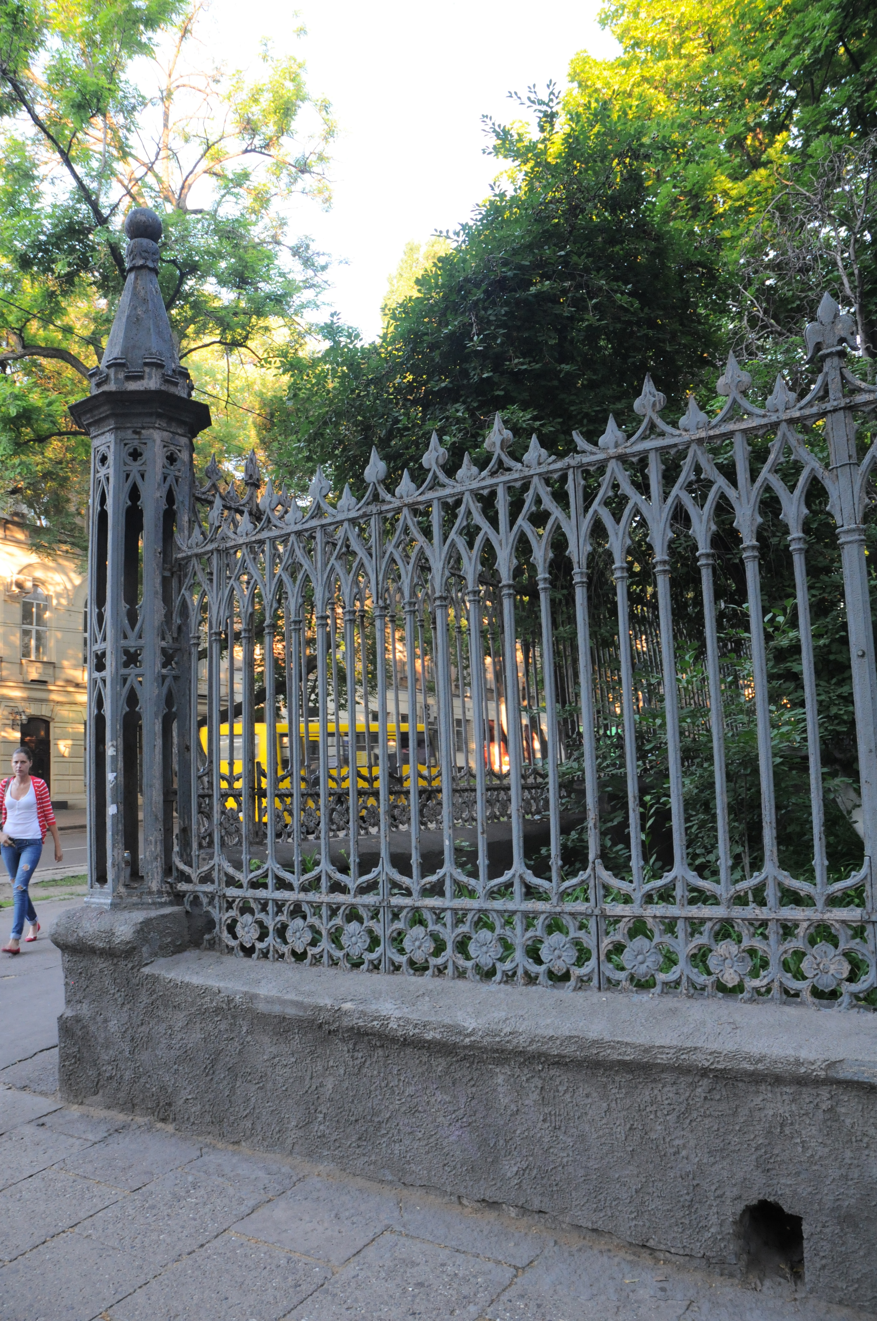 Одеса, синагога Бродського, огорожа